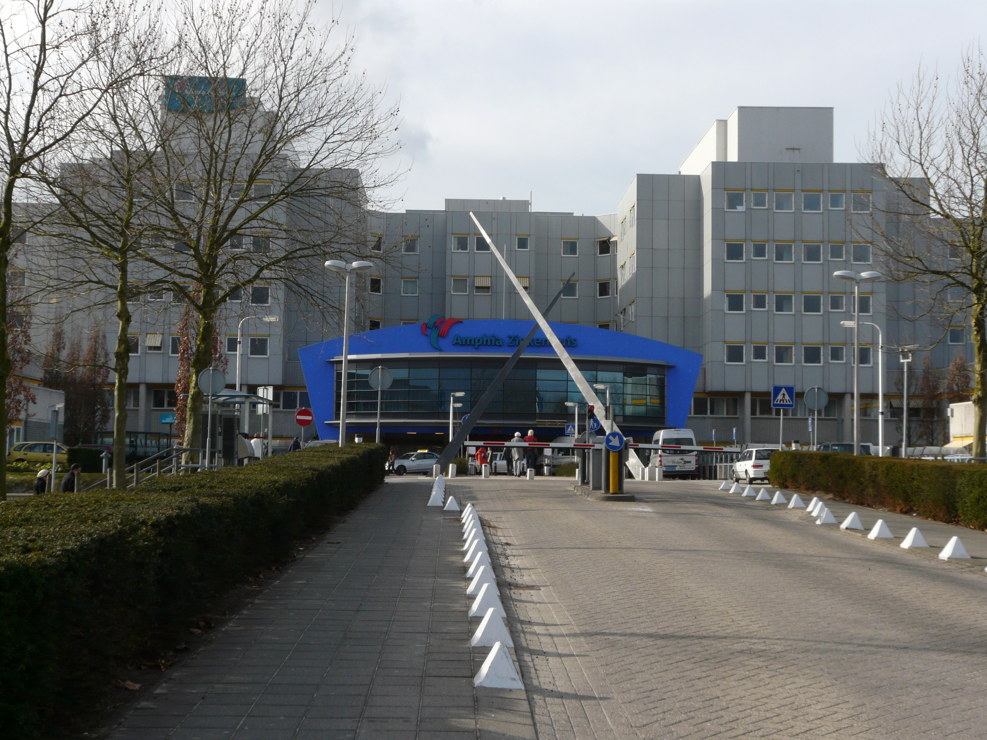 Zicht op een deel van het voormalige gebouw van het Amphia ziekenhuis gevestigd aan de Molengracht 21 in Breda